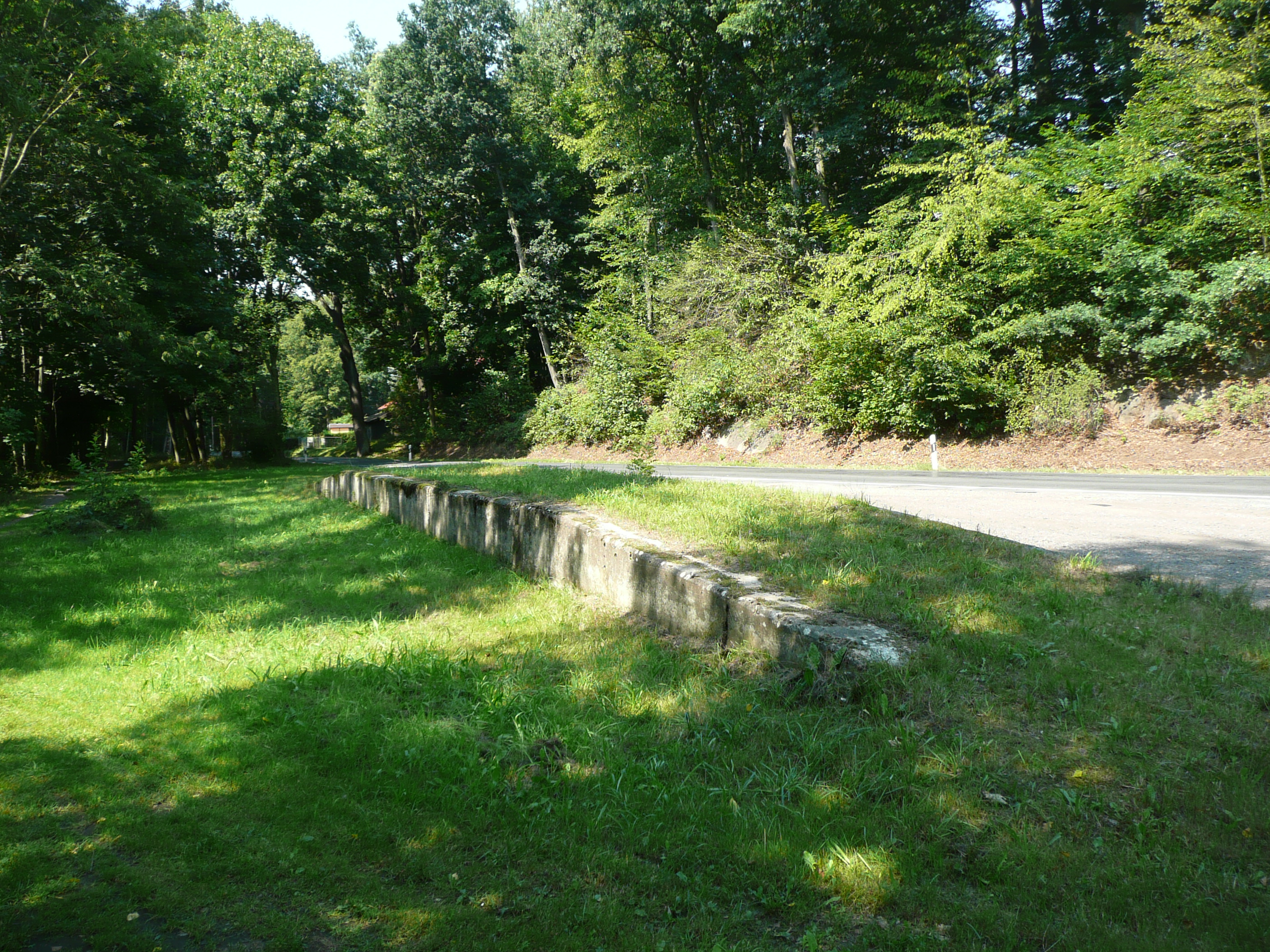 erhaltene Laderampe der Station Niederreinsberg der ehemaligen Bahnstrecke Wilsdruff-Nossen